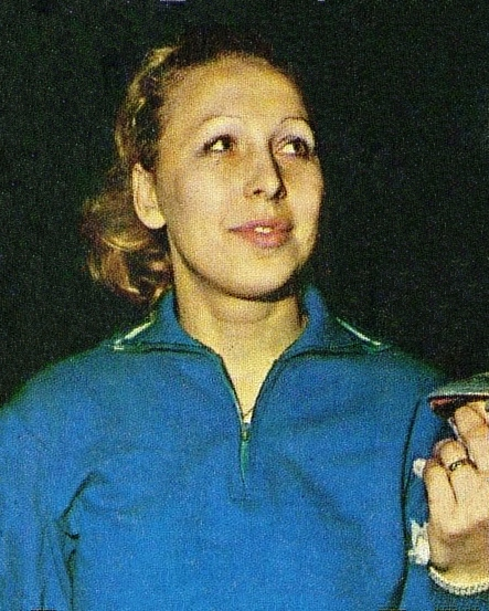 SPORT VEDETTES-PANINI 1974-Figurina n.107- BELOVA (URSS) SCHERMA